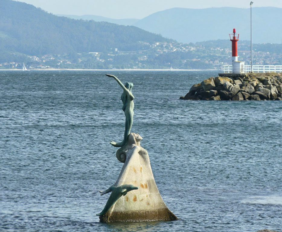 Cangas do Morrazo-Galeón